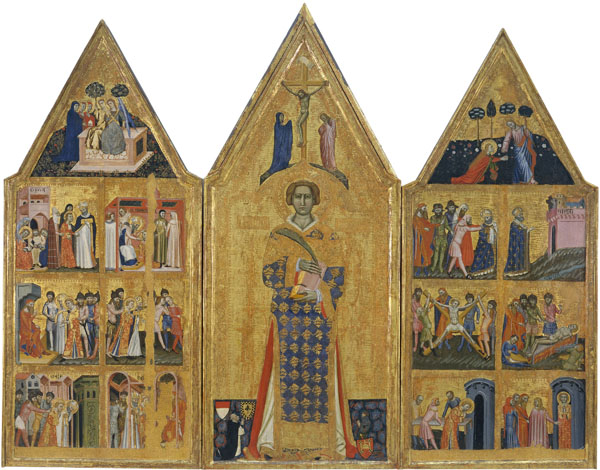 Retaule de sant Vicenç del mestre de Estopanyà, cap a 1350-1370.